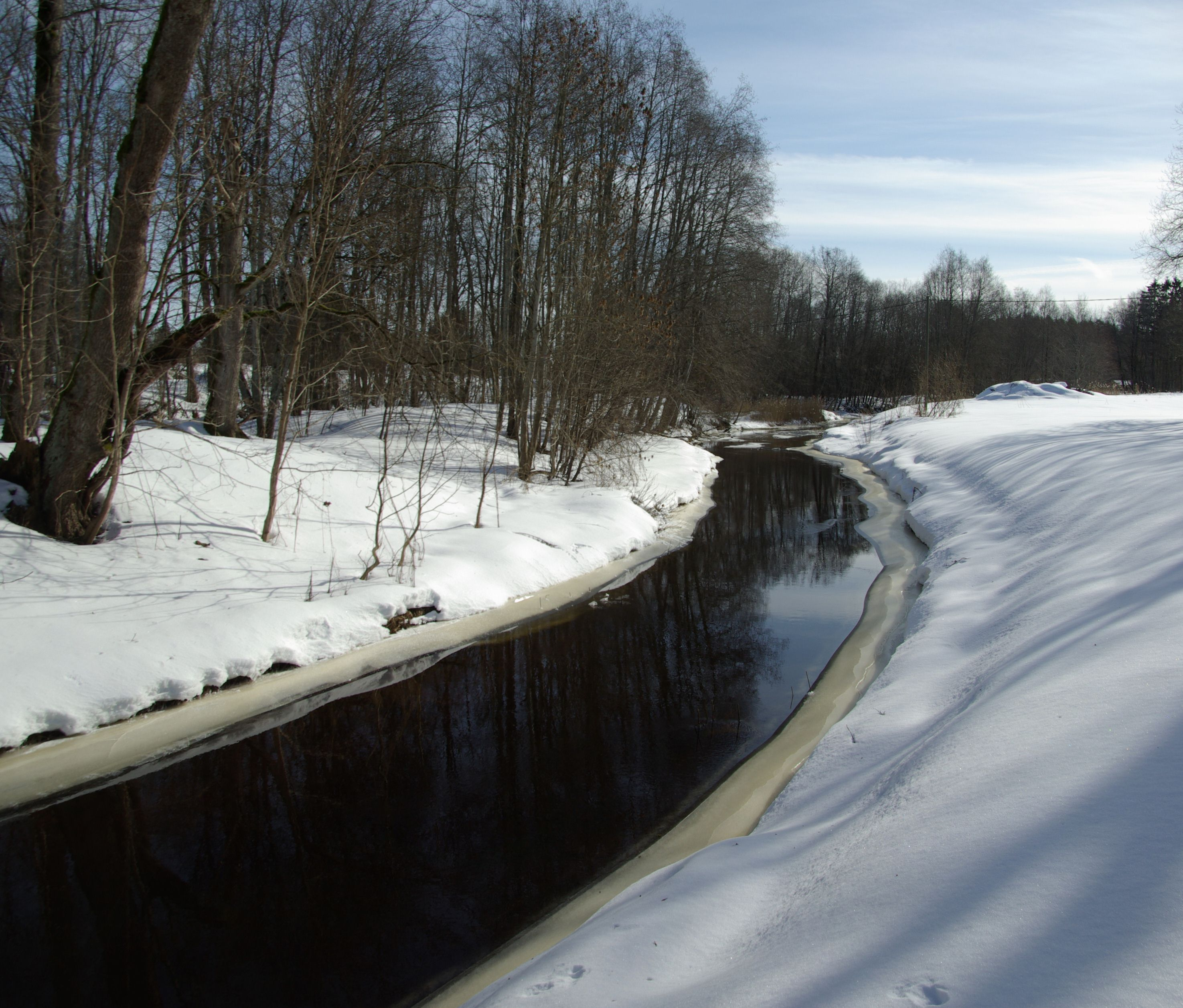 Pirita jõgi on 105 kilomeetri pikkune jõgi, mis algab umbes 20 km Paidest loode pool Pususoos ja suubub Tallinnas Pirital Tallinna lahte.